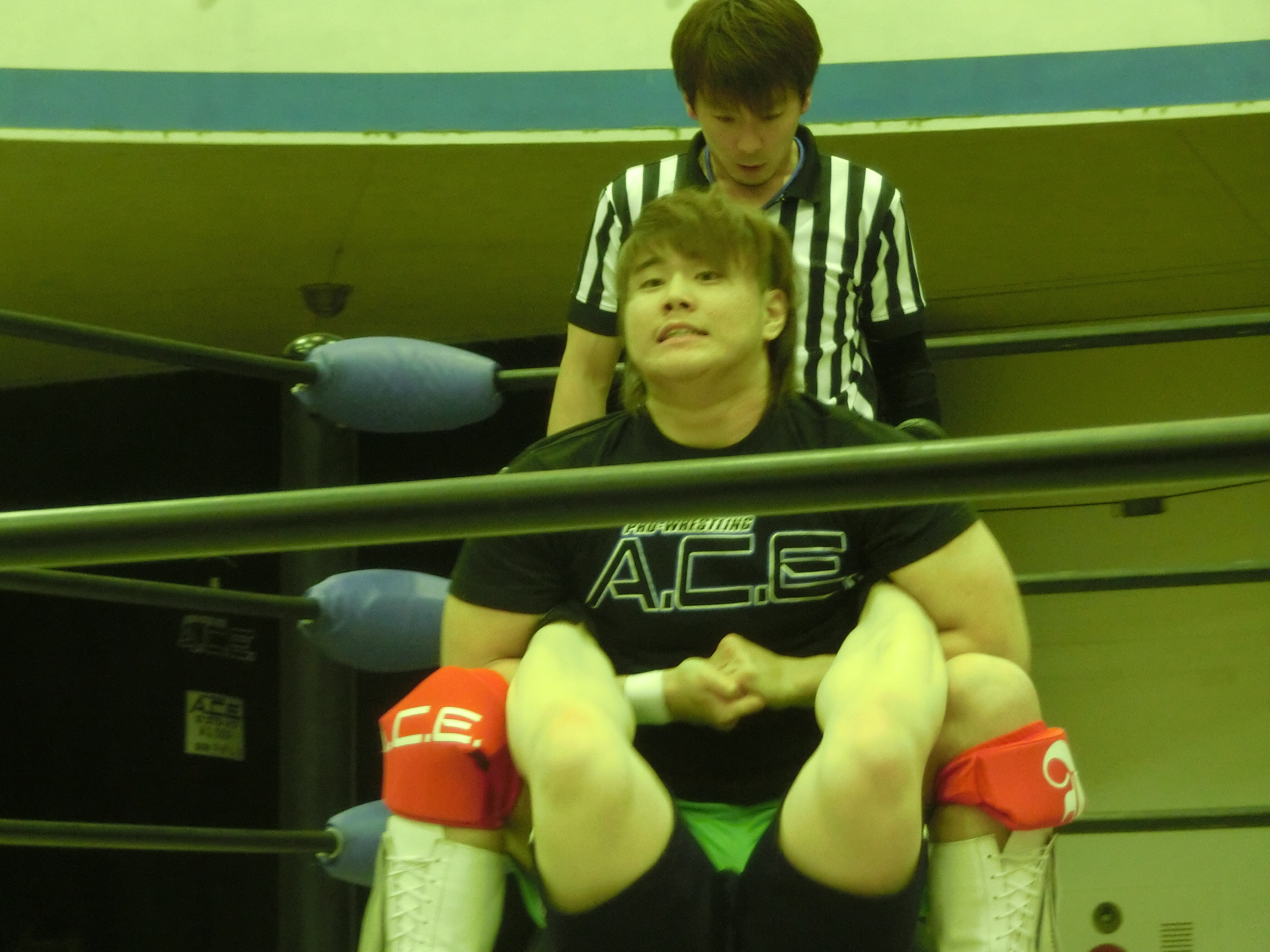 頓所準（ACE）